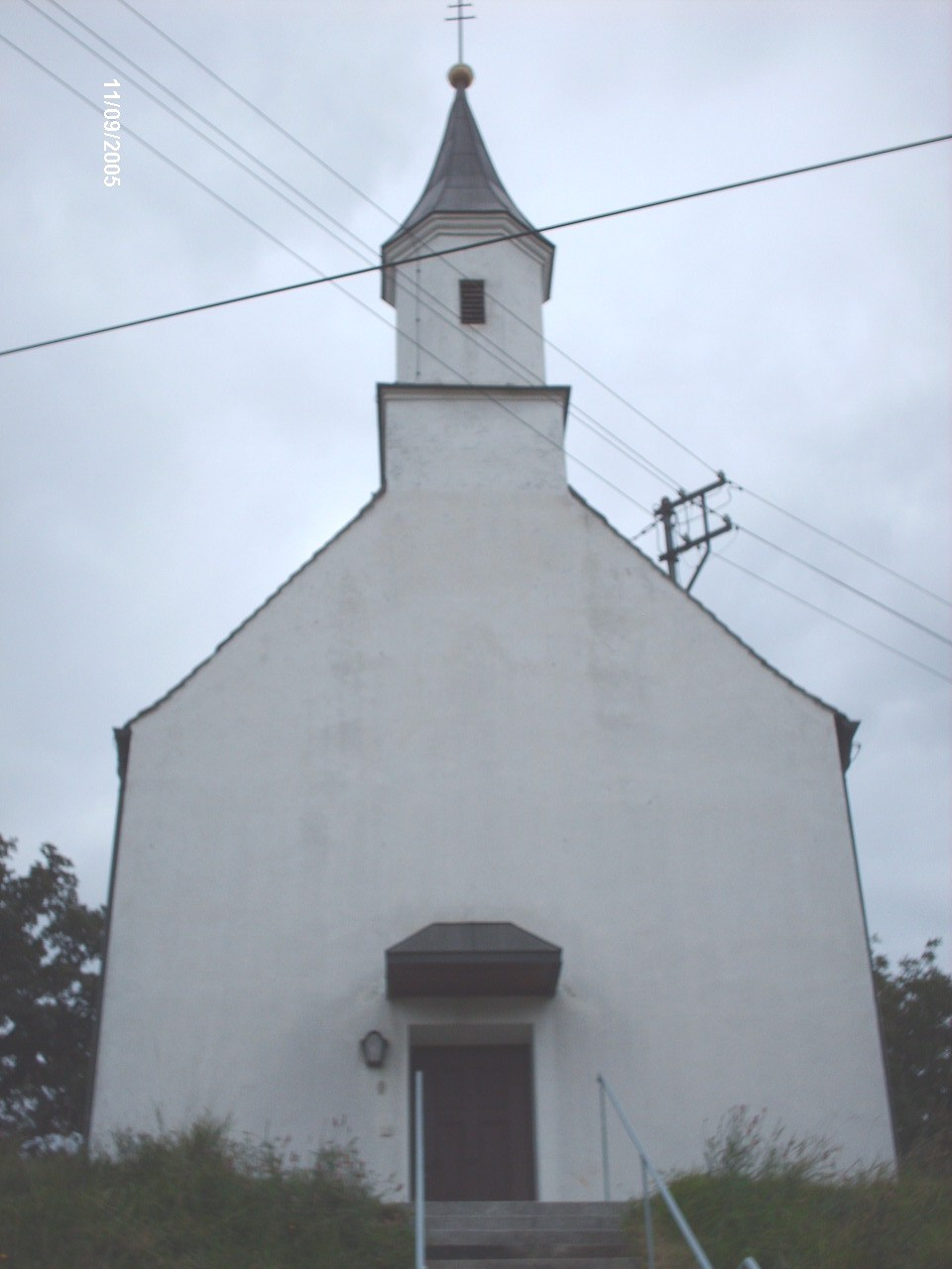 Kath. Kapelle St. Valentinus in Katzenthal